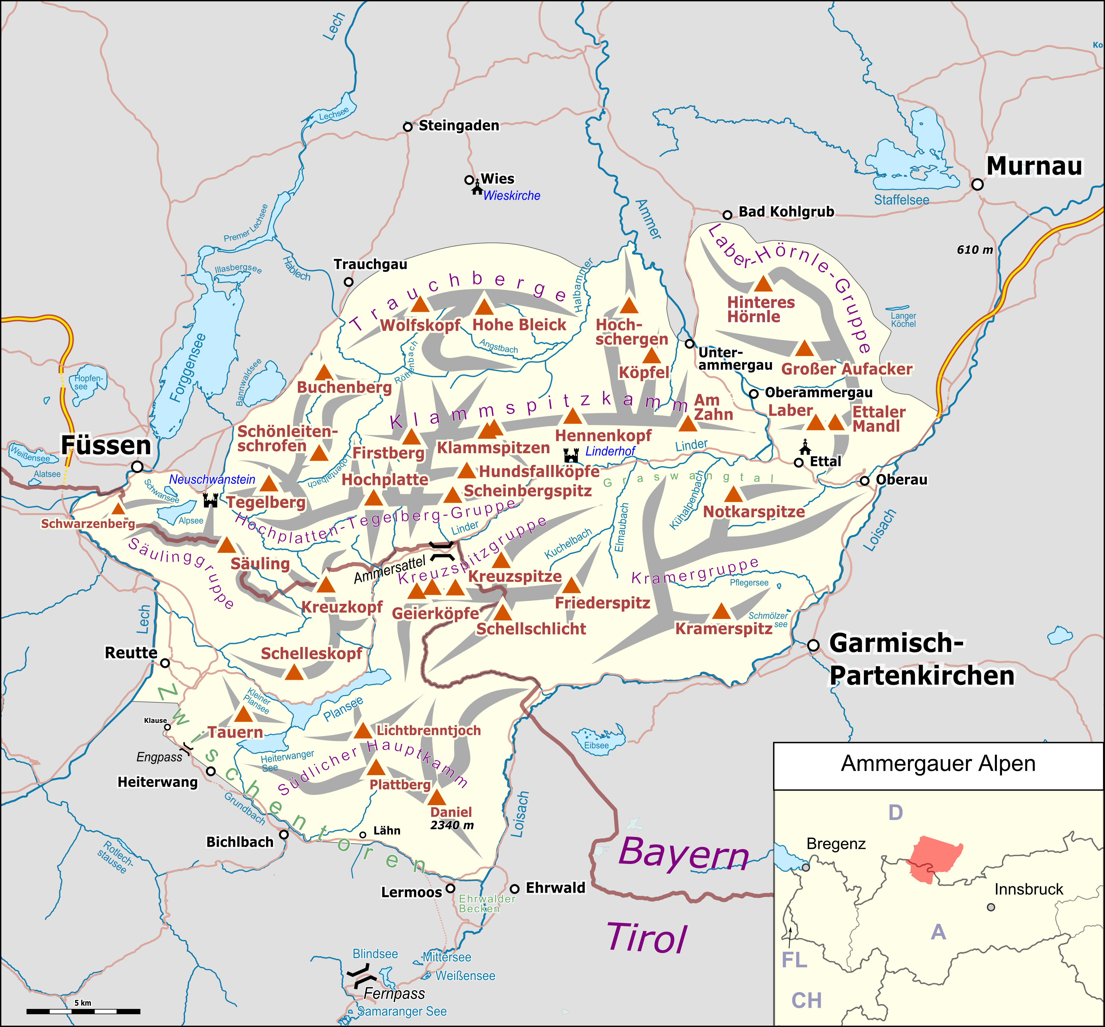 Übersichtskarte der Ammergauer Alpen.